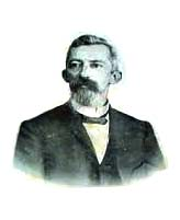 Antônio Clemente Ribeiro Bittencourt